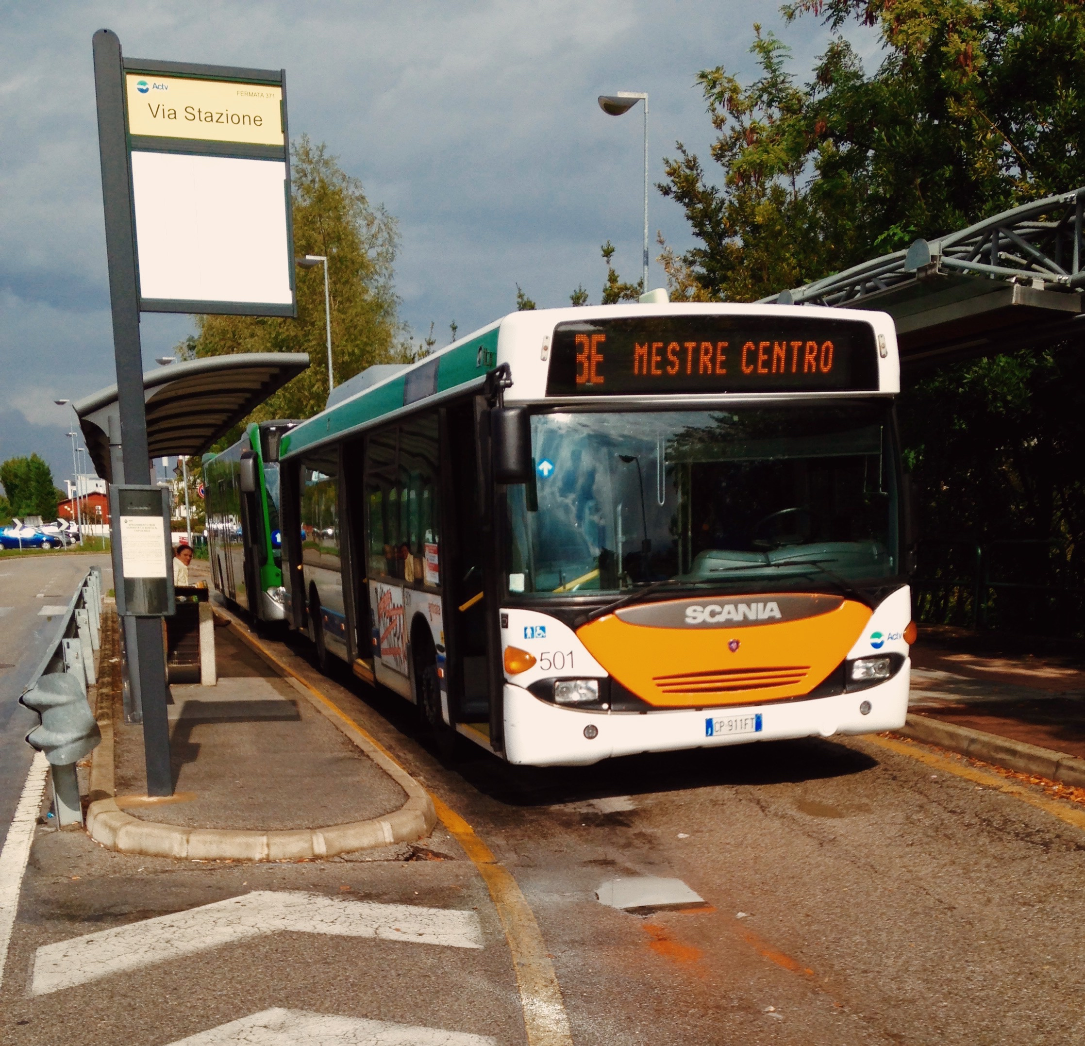 Scania Omnicity ACTV n.501 in sosta al capolinea Preganziol FS, in servizio extraurbano sulla Linea 8E